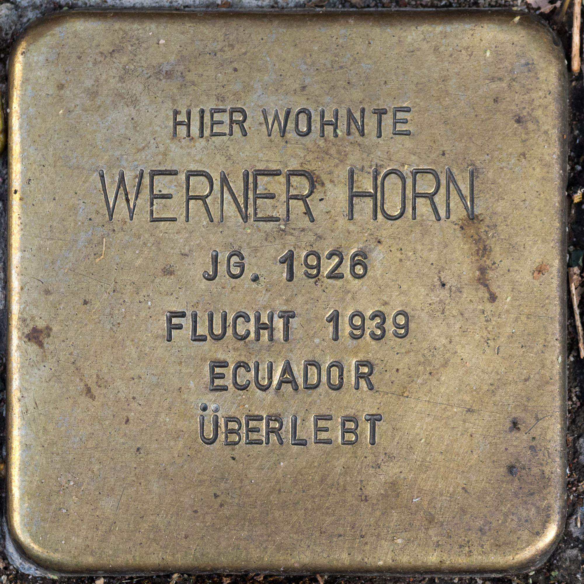 2016 Stolpersteine ToeVo Horn Werner